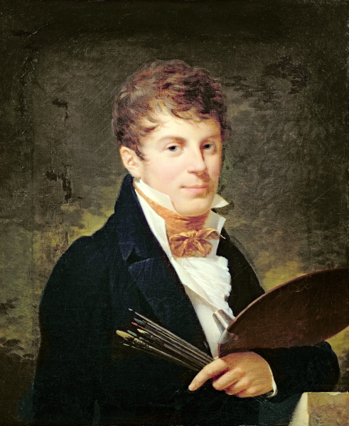 Portrait de Lancelot Théodore Turpin de Crissé (1782-1859)